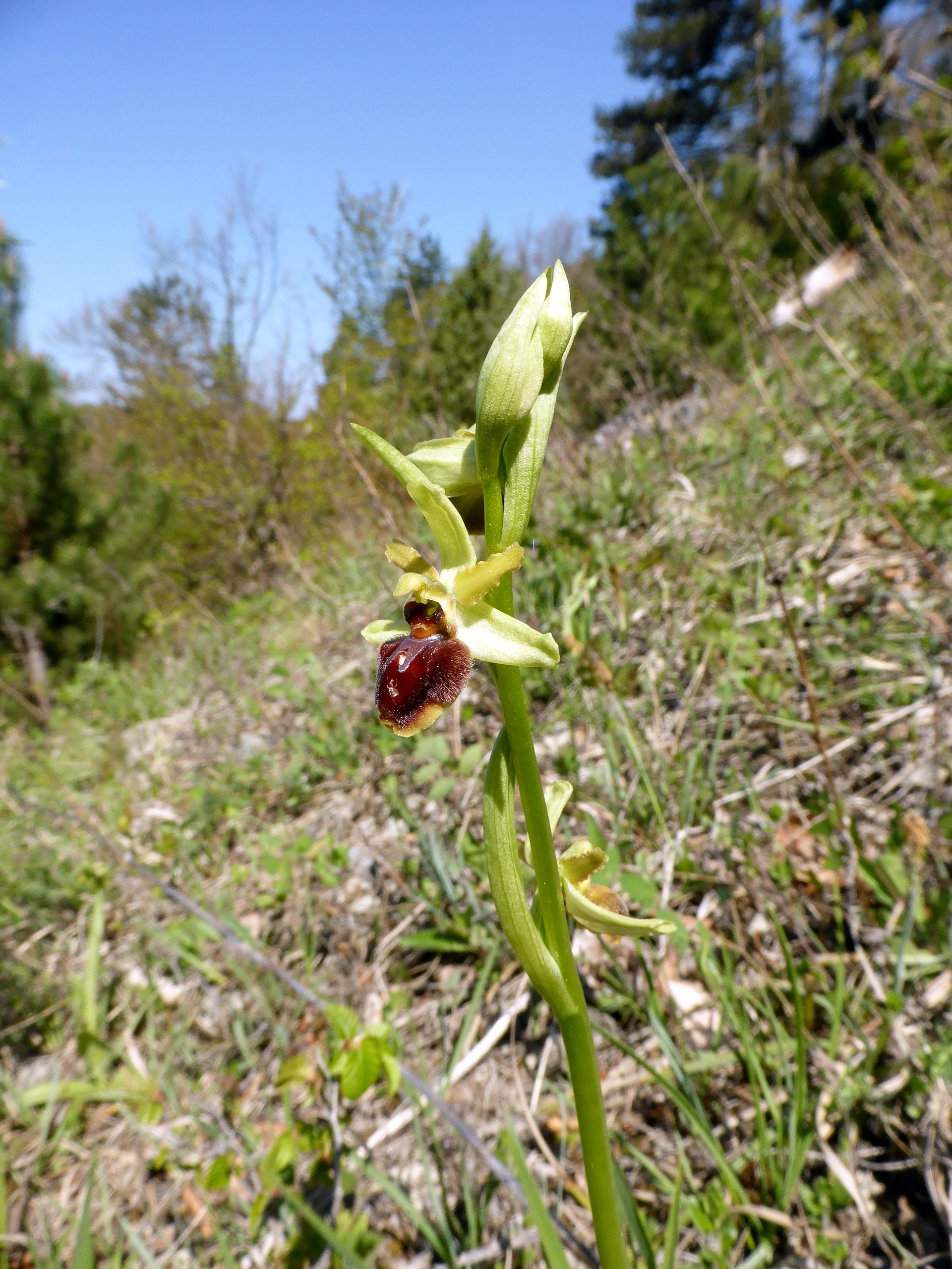 Große Spinnen-Ragwurz (Ophrys sphegodes), Henschelberg (bei Mosbach), 30.04.2017